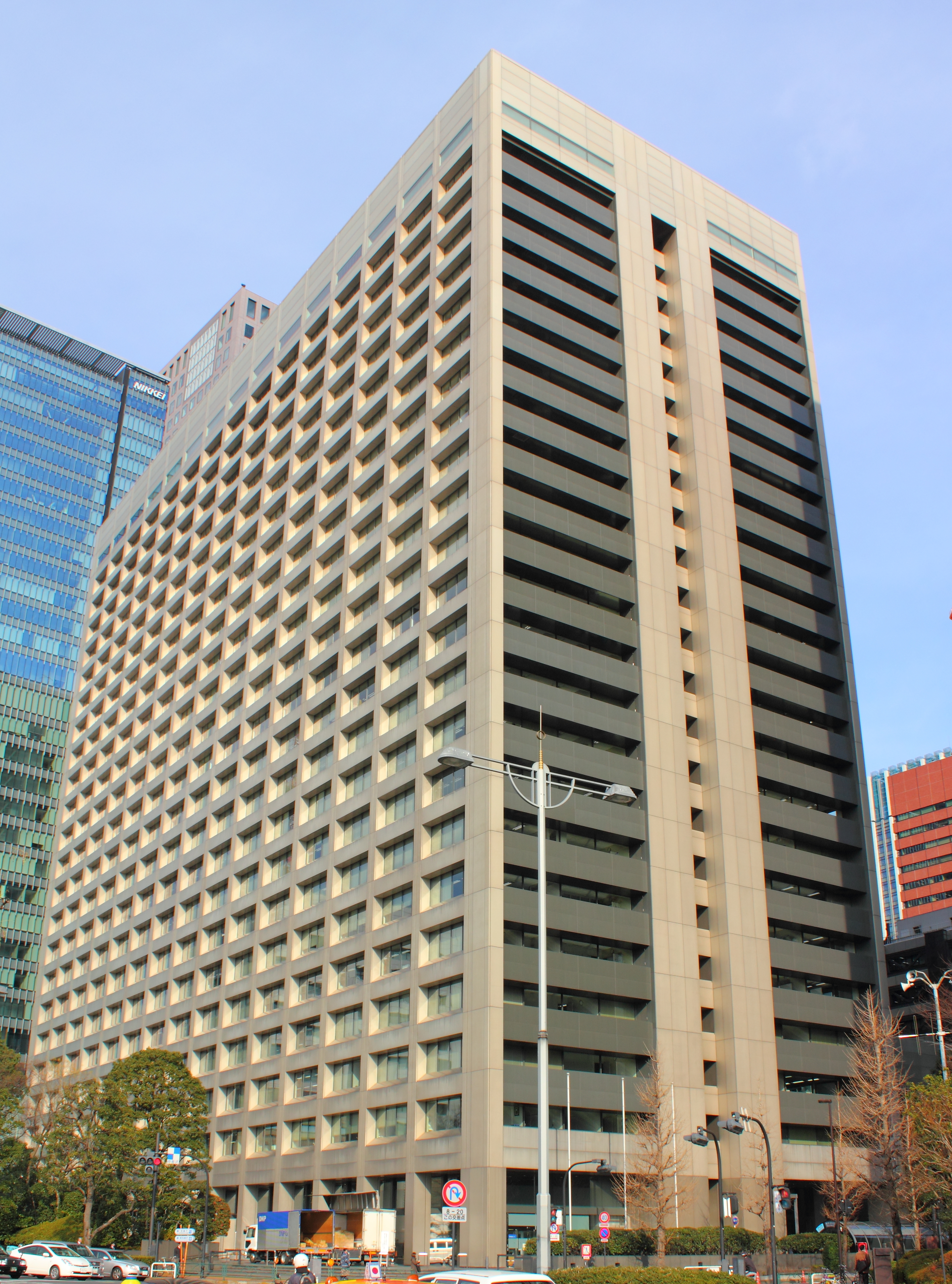 三井物産本社（東京都千代田区）